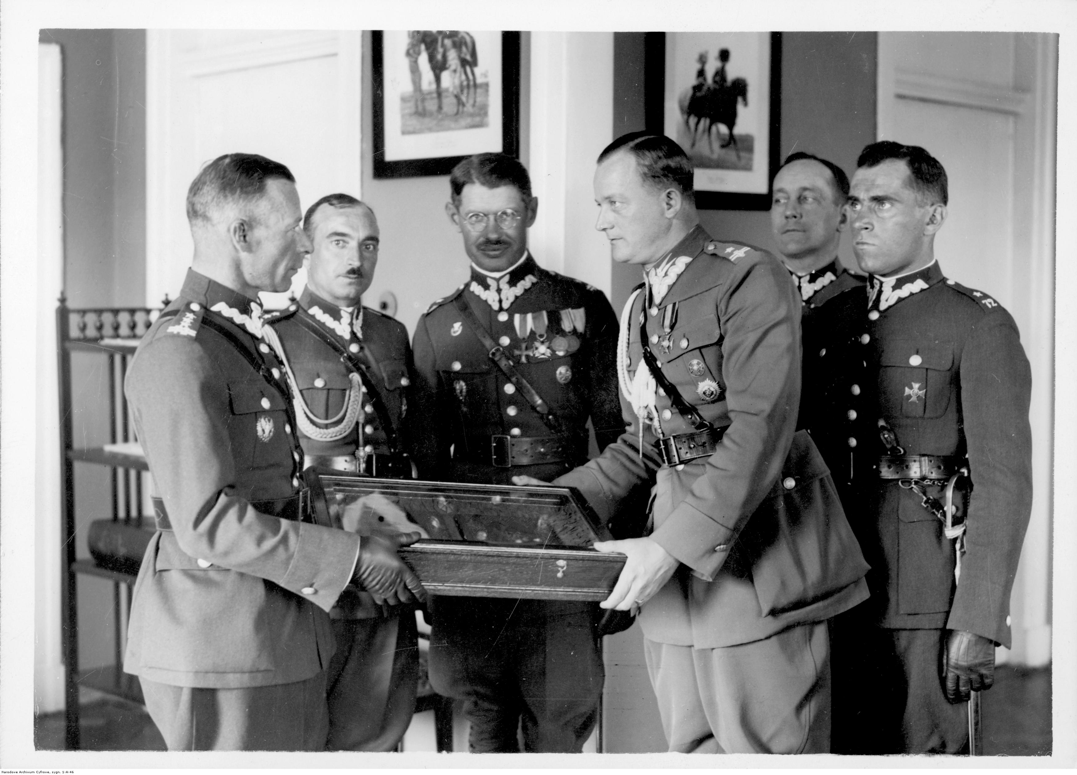 Szef Gabinetu Ministra Spraw Wojskowych major Adam Sokołowski (trzeci z prawej) w imieniu marszałka Polski Józefa Piłsudskiego odbiera odznakę honorową z historią 72 Pułku Piechoty wręczoną przez delegację pułku. Koncern Ilustrowany Kurier Codzienny - Archiwum Ilustracji. Sygnatura: 1-A-46